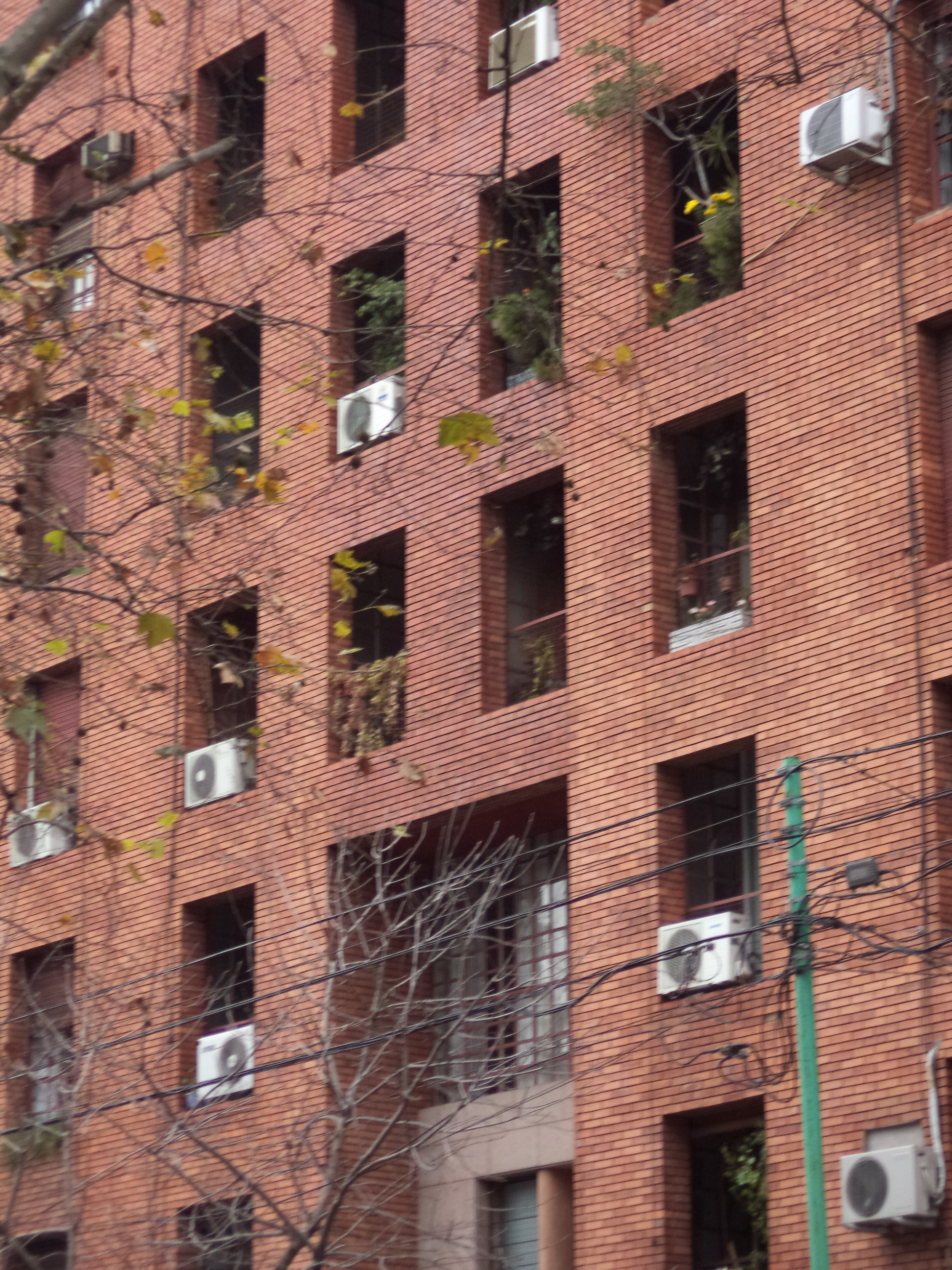 Detalle de la fachada del edificio en Medrano 172, ciudad de Buenos Aires.